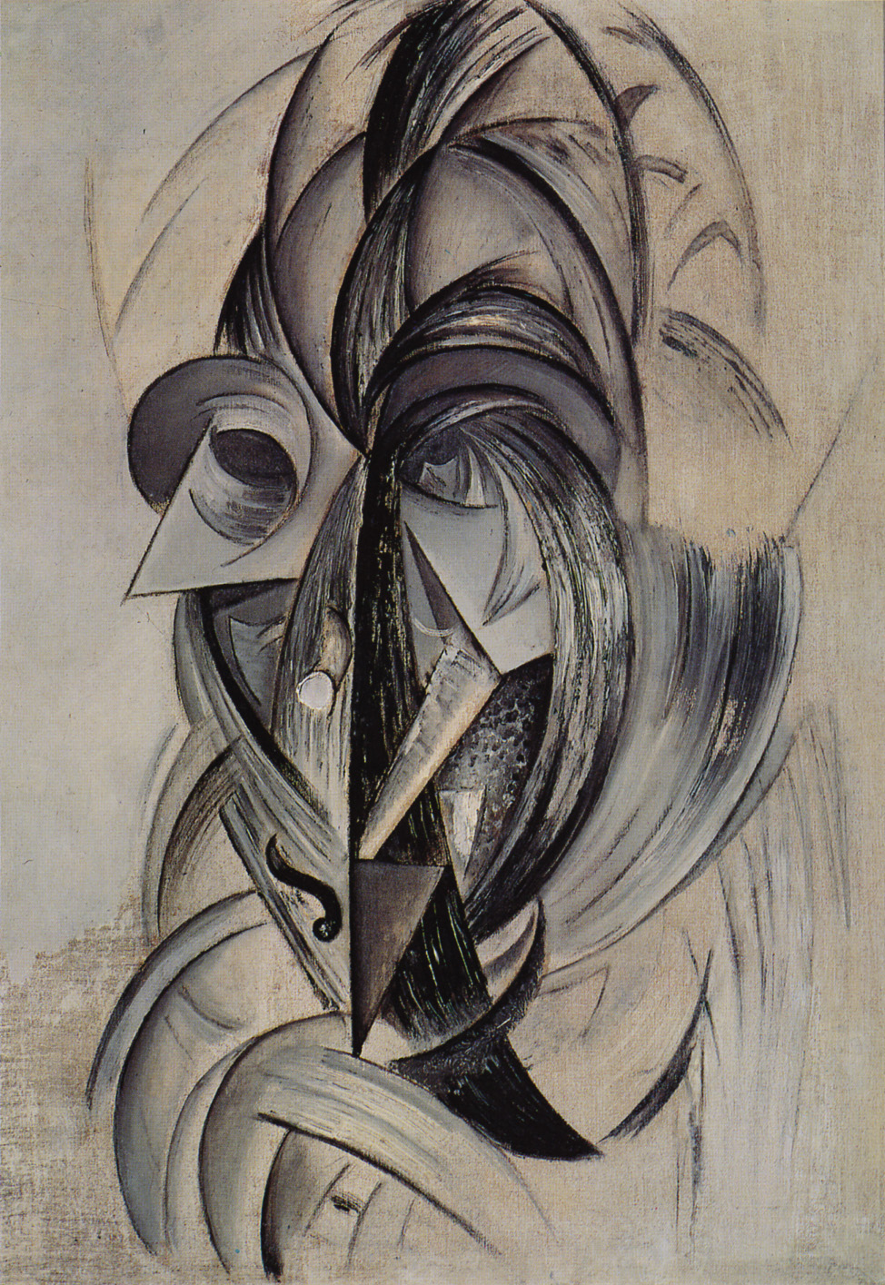 Pintura de Guilherme de Santa-Rita